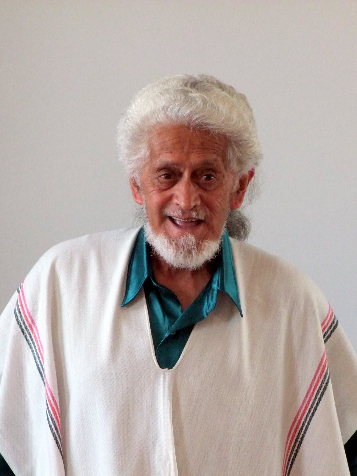 Te Huirangi Waikerepuru